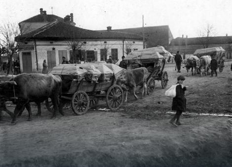 Srpski (latinica): Prevoz umrlih od pegavog tifusa niškim ulicama u vreme Velikog rada 1915.